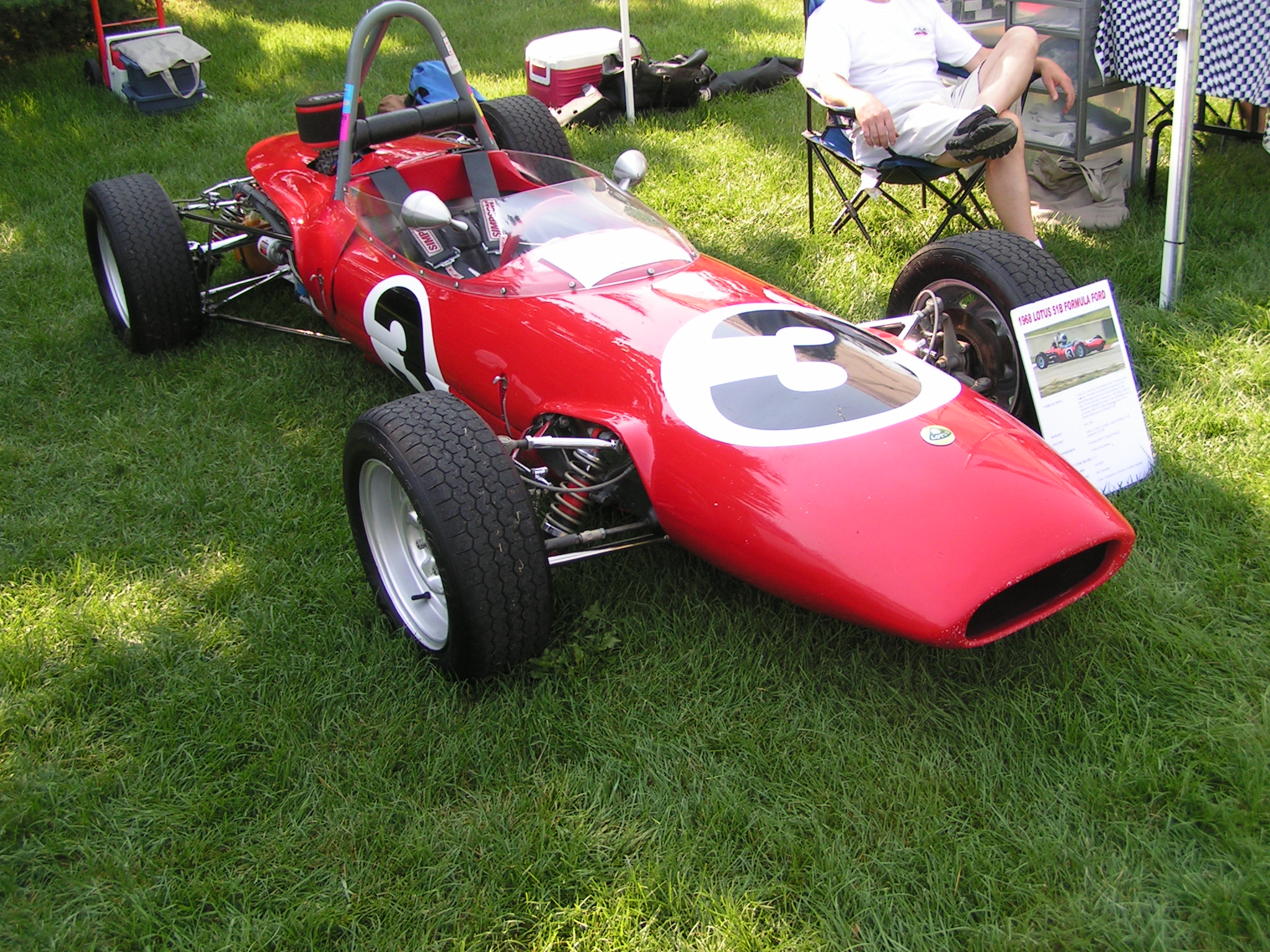 1968 Lotus 51B Formula Ford1968 Lotus 51B Formula Ford